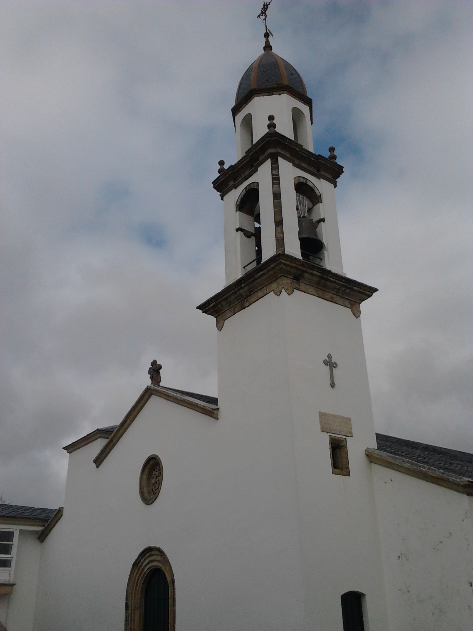 Fachada da igrexa parroquial de Santa María do Mar, Cedeira